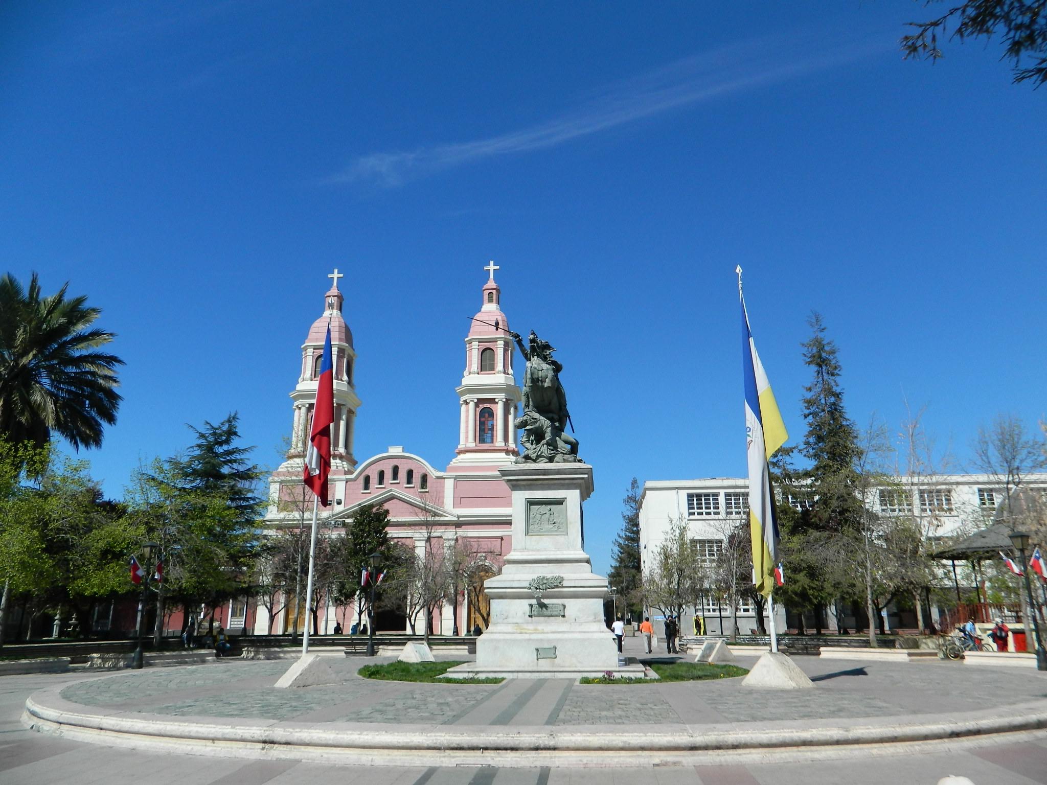 La Plaza de Los Héroes corresponde a una traza fundacional de la Villa Santa Cruz de Triana, que comprendía 64 manzanas, con la plaza en el centro cortada en cruz por dos calles (la Cruz de Triana). Su fundador, el Gobernador José Antonio Manso de Velasco, en octubre de 1743, le da esta forma especial que sólo la tienen cinco plazas fundacionales de América. El 1º y 2 de octubre de 1814 fue escenario de la Batalla de Rancagua, donde se puso fin al período de la Independencia de Chile llamado la “Patria Vieja” y en donde el generar Bernado O’Higgins con un número reducido de patriotas resiste por dos días cercado por las fuerzas realistas. En el centro de la plaza se ha erguido un monumento ecuestre en honor a O’Higgins, que recuerda este importante acontecimiento histórico. Su borde suroriente es el más antiguo, en donde se encuentran la Gobernación de Cachapoal, la Casa Parroquial y la Catedral. La plaza de Rancagua es única, no puede confundirse con otra. Hablar de esta plaza es referirse al lugar que dio origen a la ciudad y desde la que se extendió hacia los cuatro vientos a partir de dos calles, ejes principales, dándola la singularidad de una plaza en cruz. This is a photo of a national monument in Chile: 377